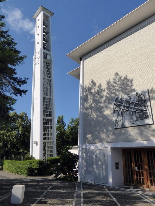 Röm.kath Kirche Allerheiligen